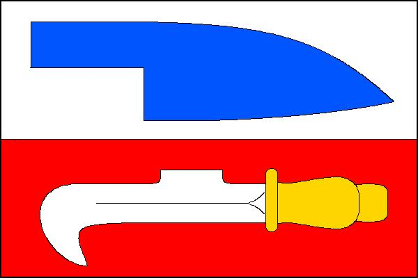 Vlajka obce Nebovidy